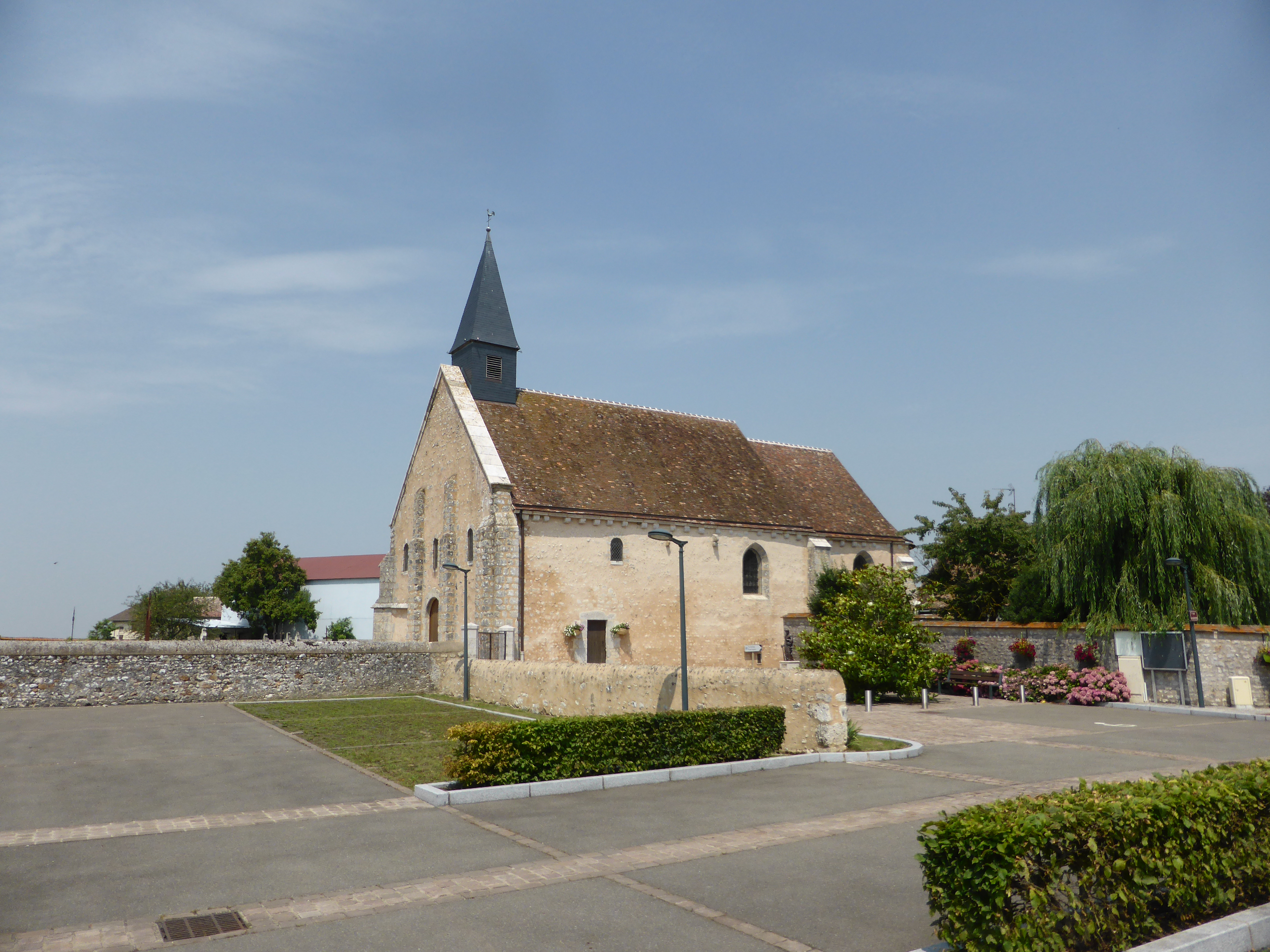 Église Saint-Jean-Baptiste de Gellainville, dans l'Eure-et-Loir.